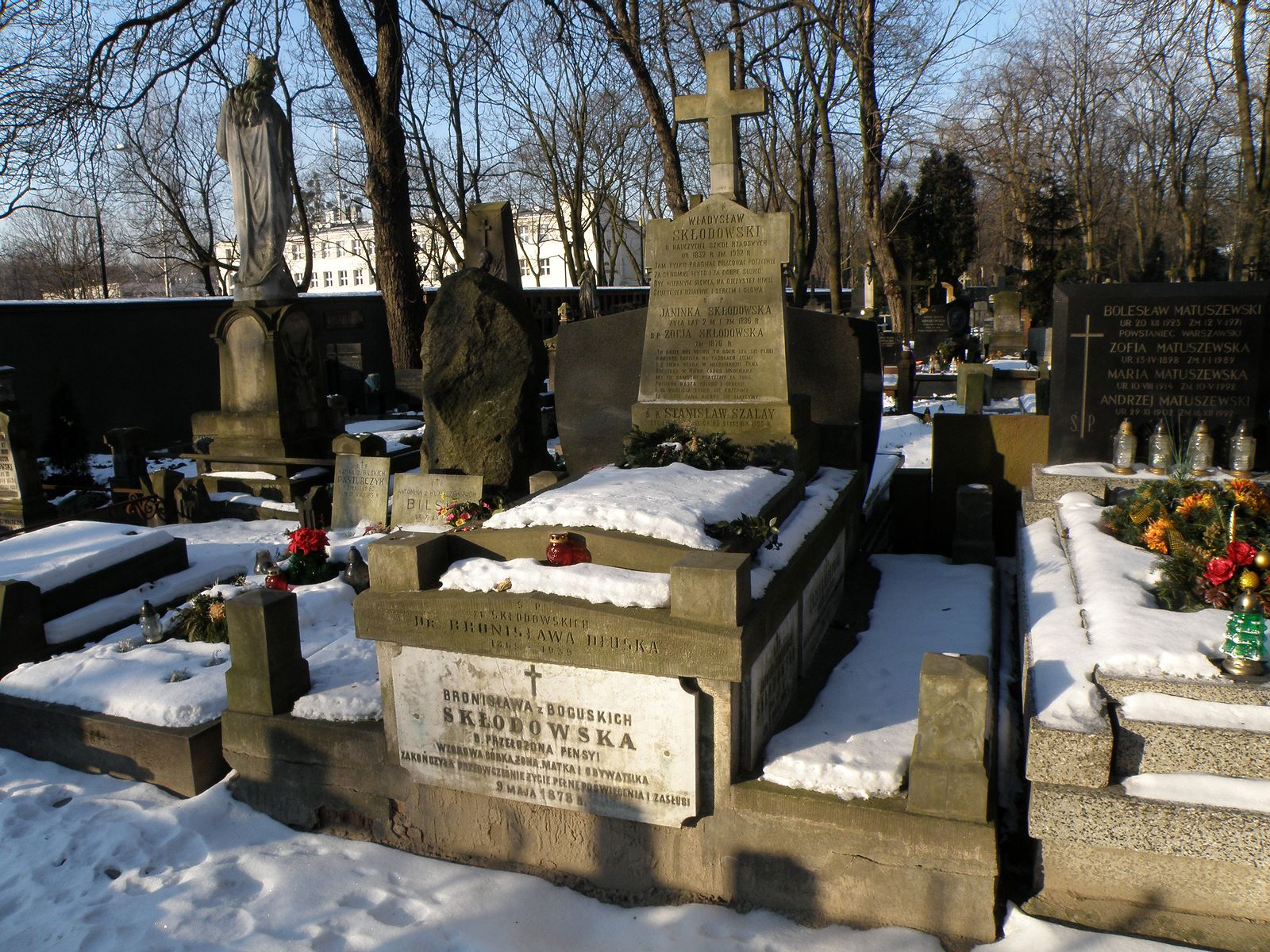 Grób rodzinny Skłodowskich na Powązkach Bronisława Dłuska